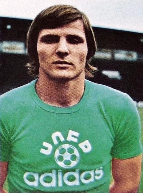 Dominique Bathenay en 1974, 'Ageducatifs football 1974 - 1975', Panini figurina.